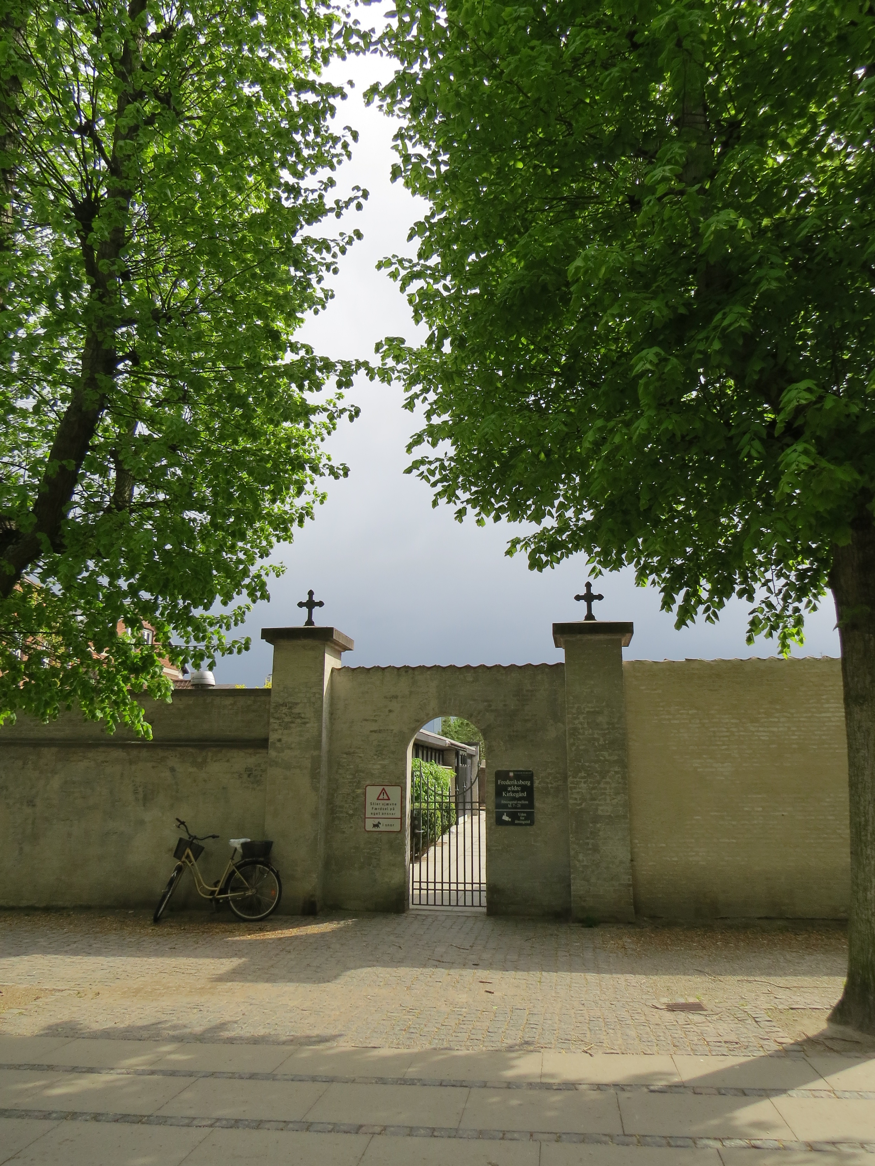 Sideindgang til Frederiksberg Ældre Kirkegård